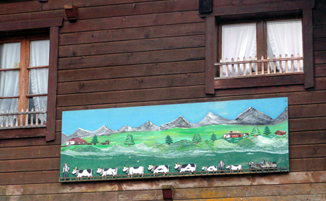 Poya : Estavannens, Fribourg, Switzerland.